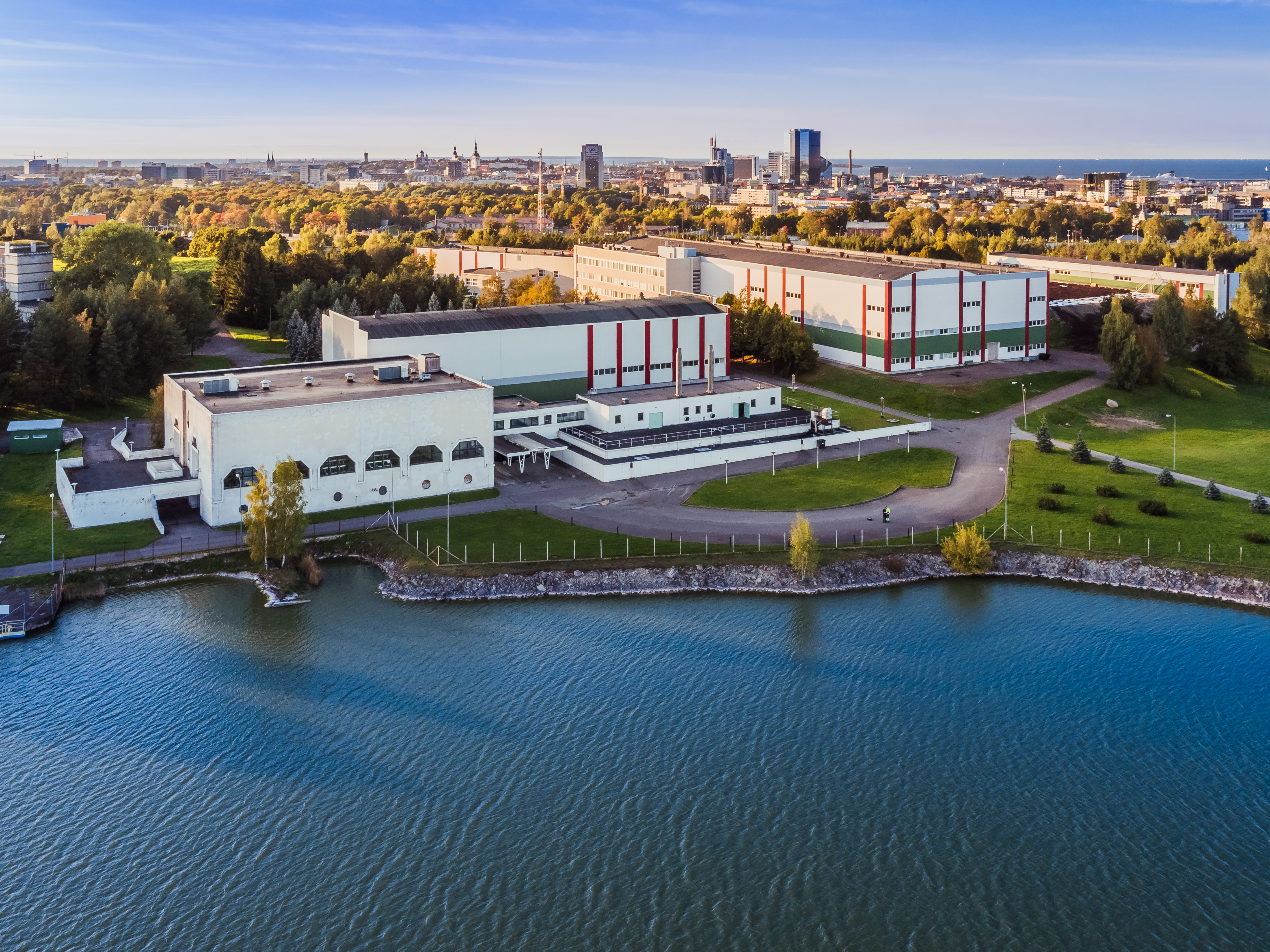 Ülemiste veepuhastusjaam Autor: Kaupo Kalda